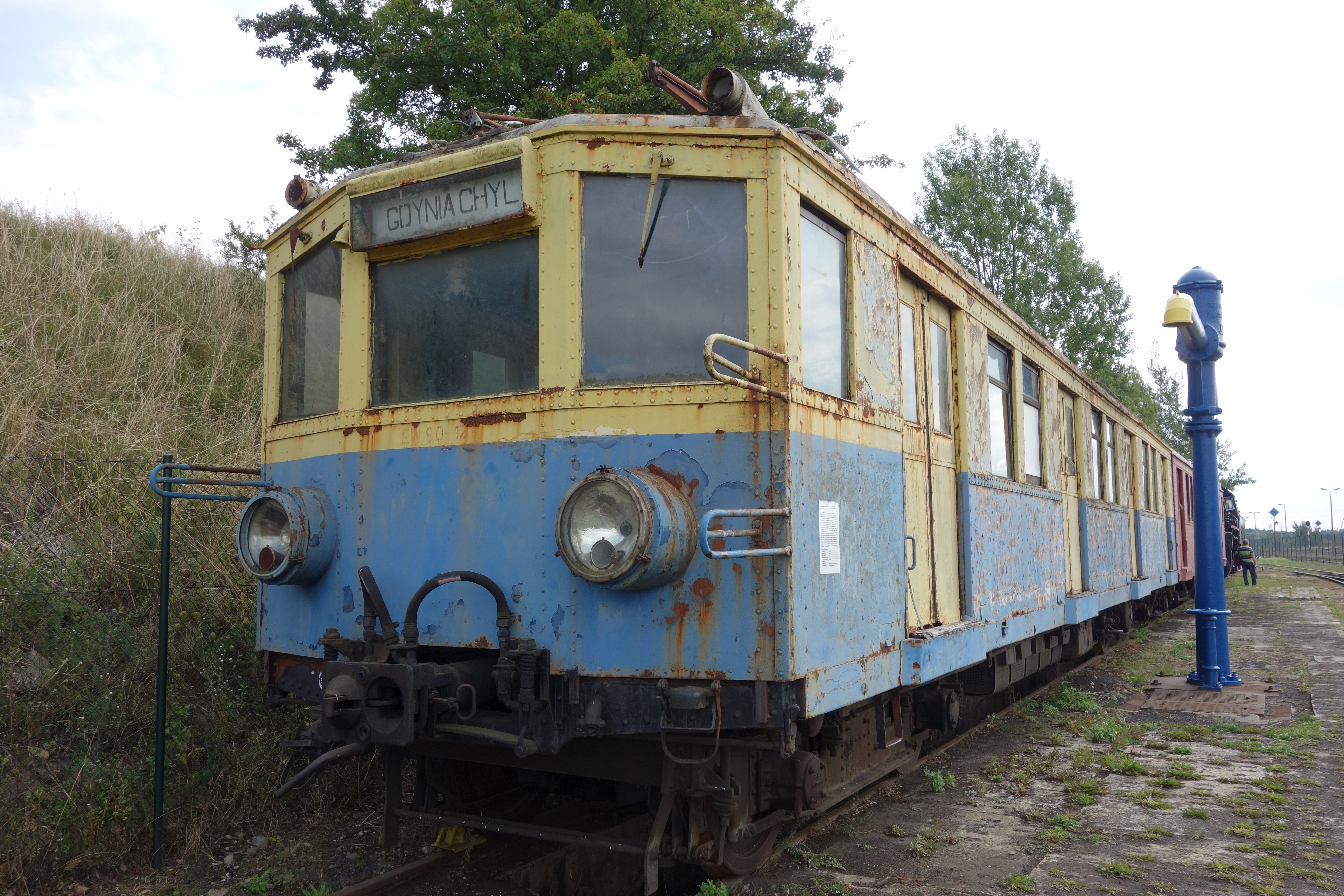 Kościerzyna - Muzeum Kolejnictwa - Elektryczny Zespół Trakcyjny EW90 This photo was taken during Railway Wikiexpedition 2014 set up by Wikimedia Polska Association in cooperation with Fundacja Grupy PKP. You can see all photographs in category Wikiekspedycja kolejowa 2014.